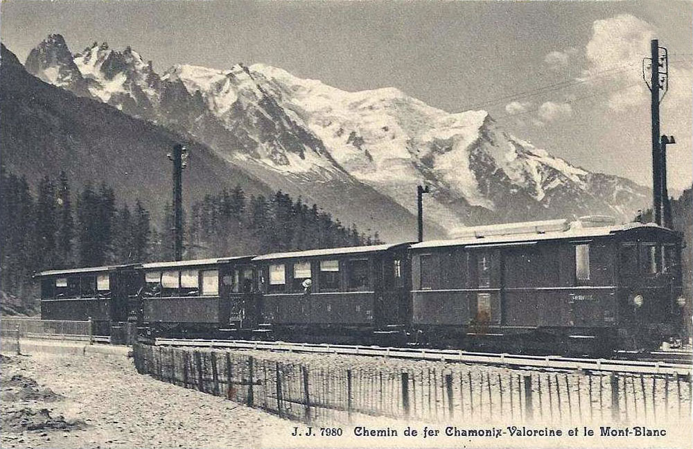 Chemin de fer Chamonix-Vallorcine et le Mont-Blanc.